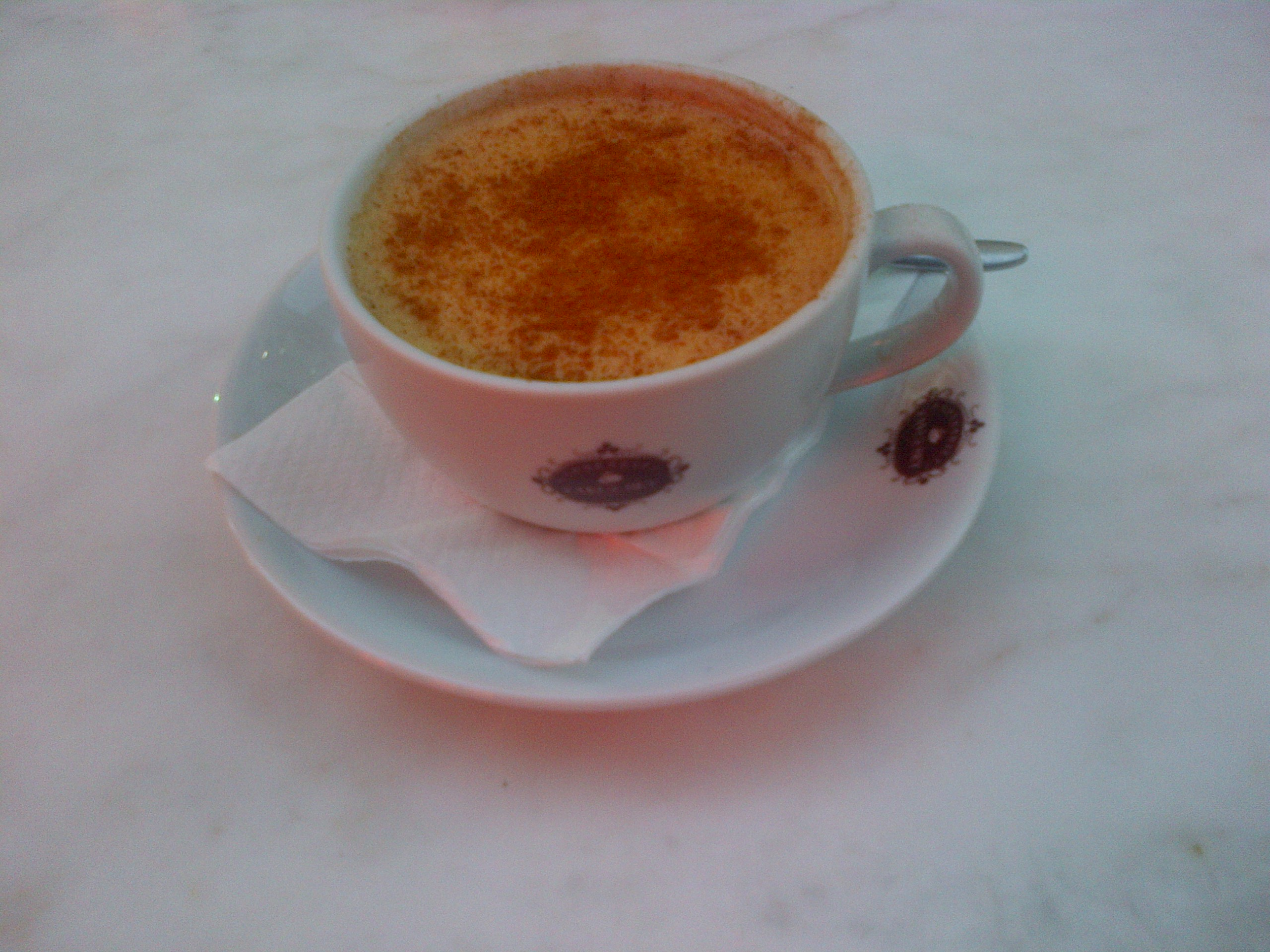 Sahlep caliente, una bebida especialmente de invierno, de la cocina turca.